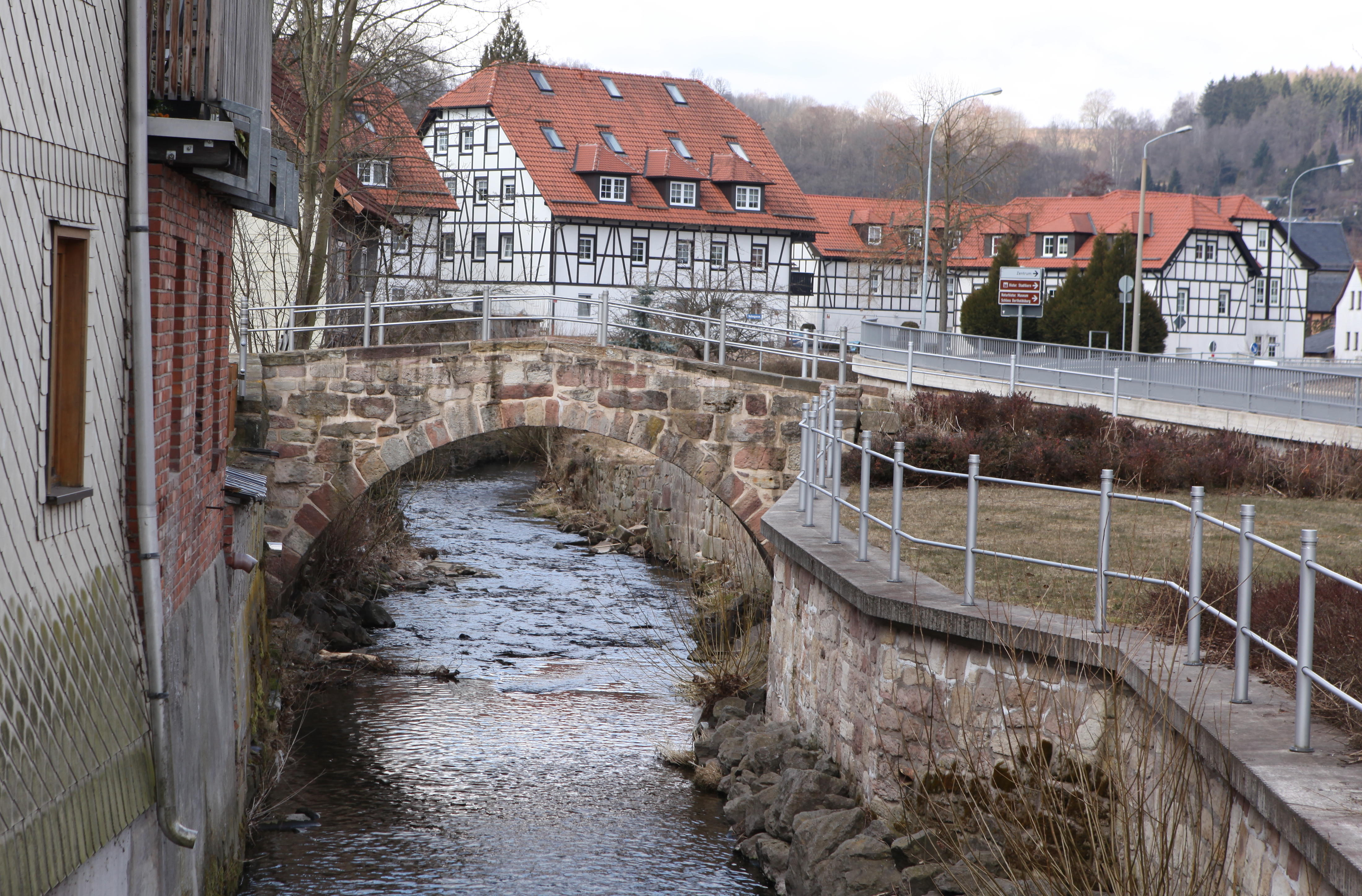 Brücke über die Nahe in Schleusingen, Landkreis Hildburghausen